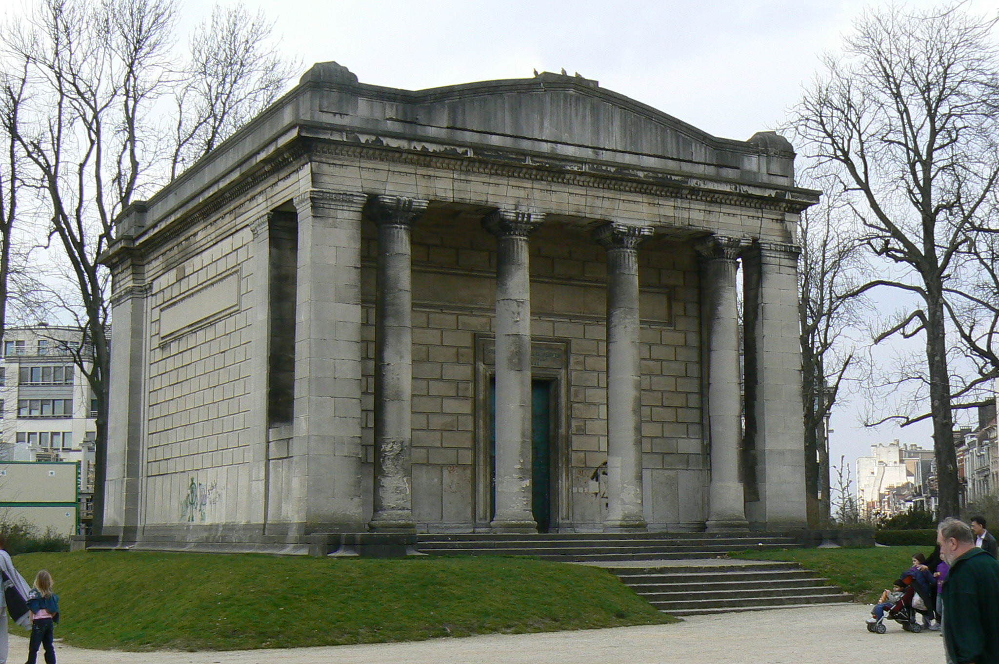 le pavillon des passions humaines